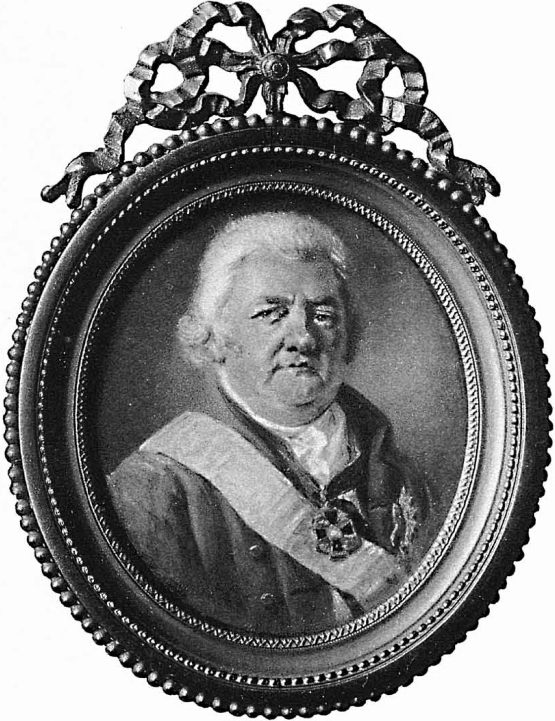 Николай Петрович Архаров (1740-1814)